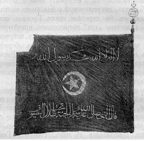 Плененото от редник Егор Жданов край Долна Митрополия зелено знаме на пророка.